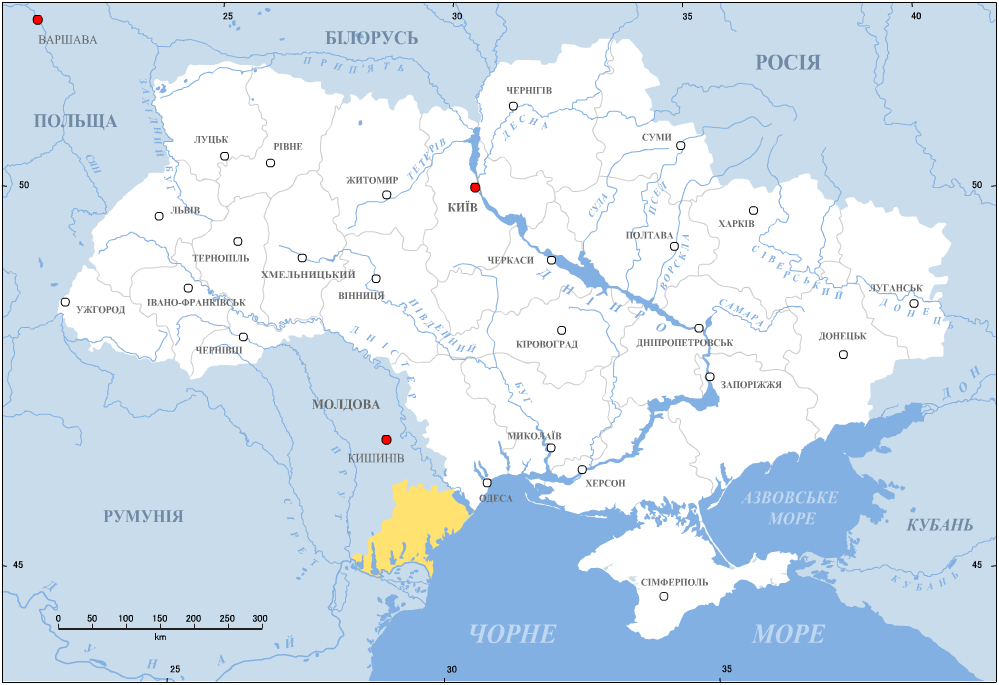 Буджак